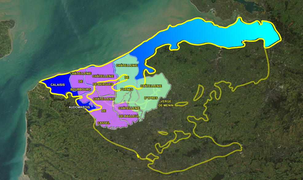 Comparaison des territoires de l'ancienne province de Flandre maritime, en violet, et son extension maximale, en vert, à la plaine maritime flamande, en bleu